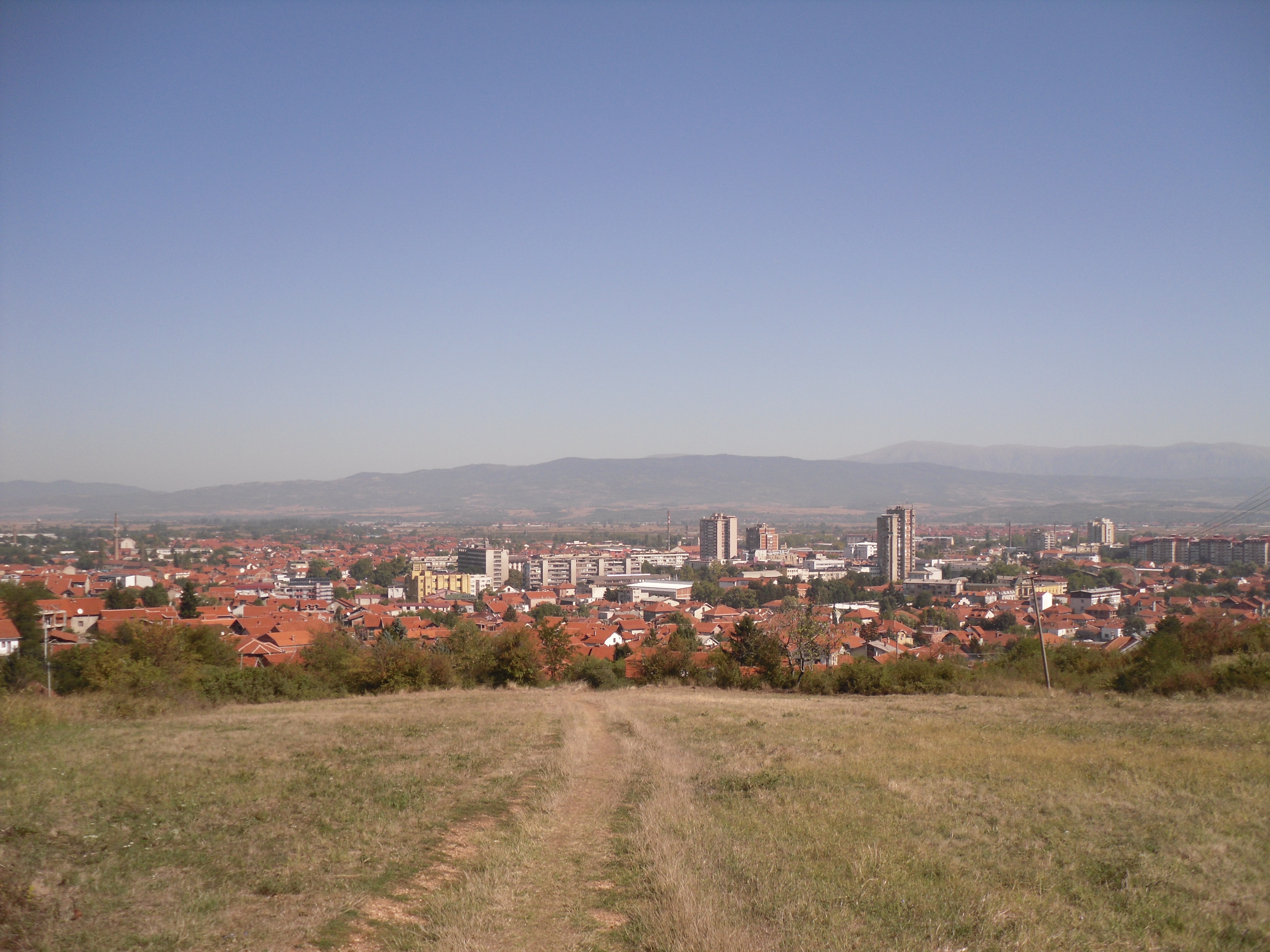 Srpski (latinica): Pogled na grad Leskovac i planinu Babičku goru.